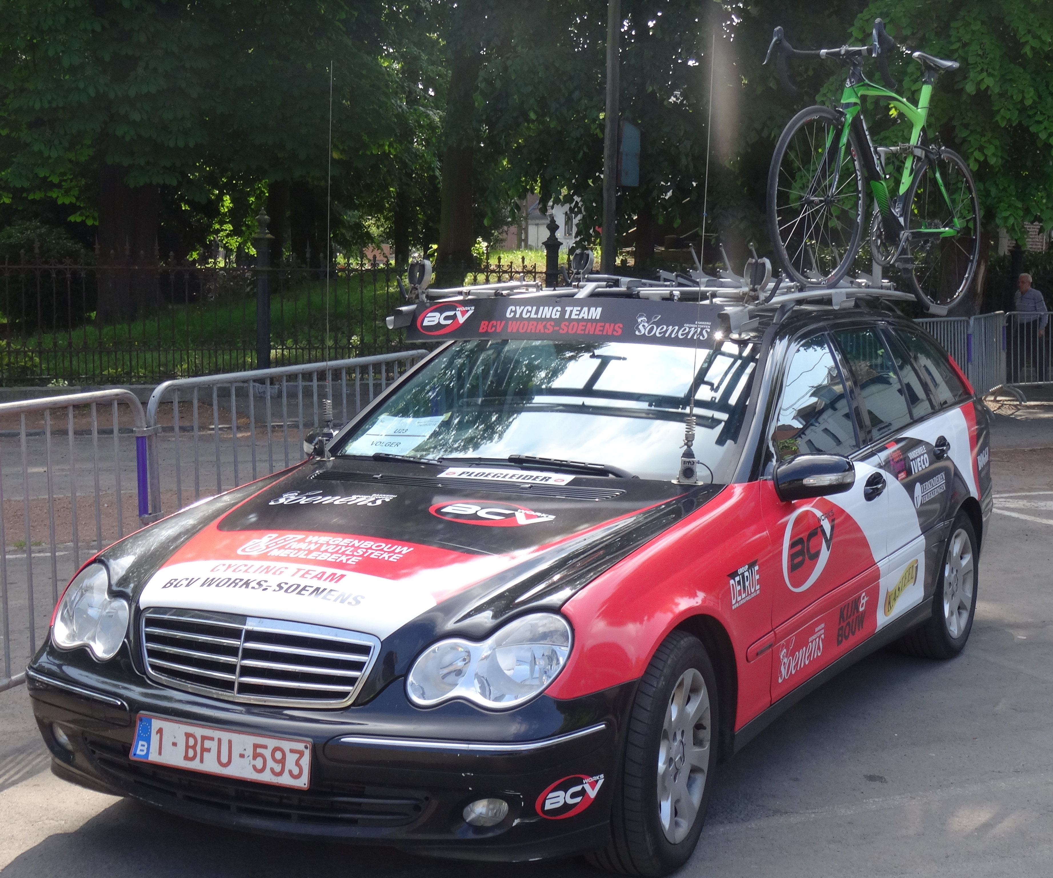 Reportage réalisé le samedi 17 mai à l'occasion du départ du Grand Prix Criquielion 2014 à Boussu, Belgique.